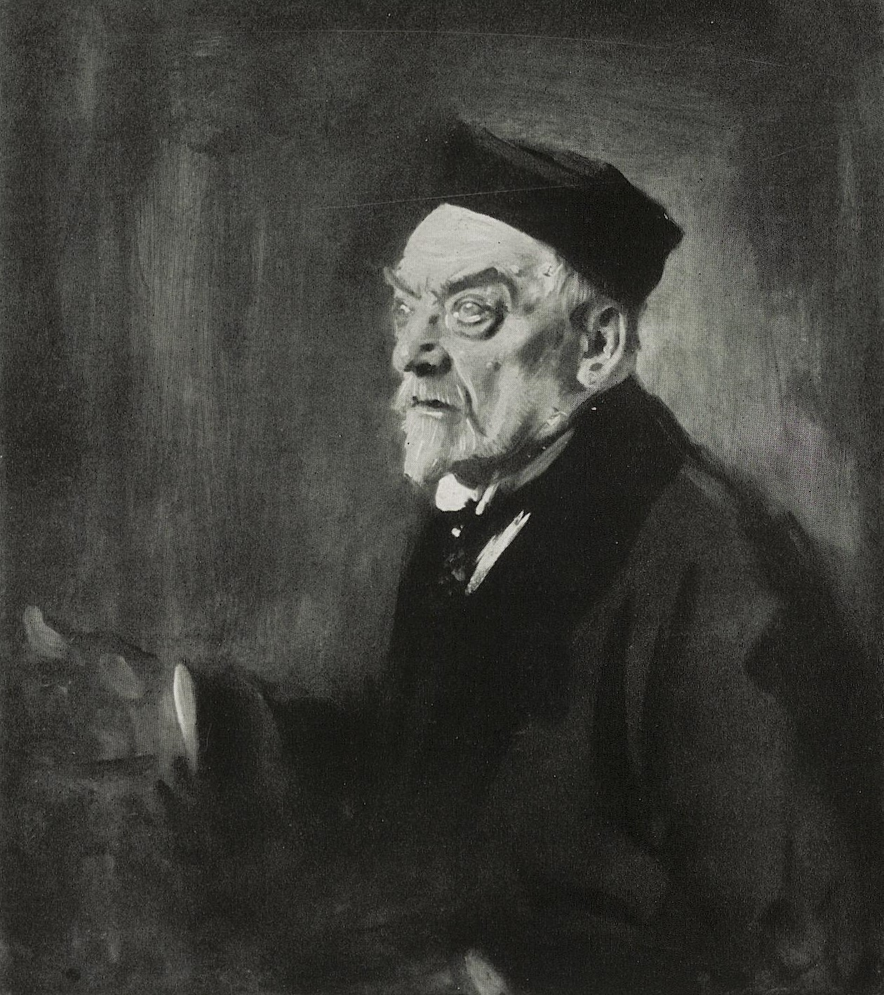 Leo Samberger - Portrait des Malers Gabriel von Hackl.